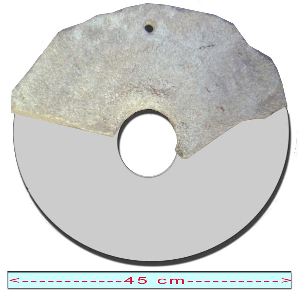 Molino Celtibero encontrado en "superficie" en la Ribera de Navarra. en zona no arqueologica. user:papix